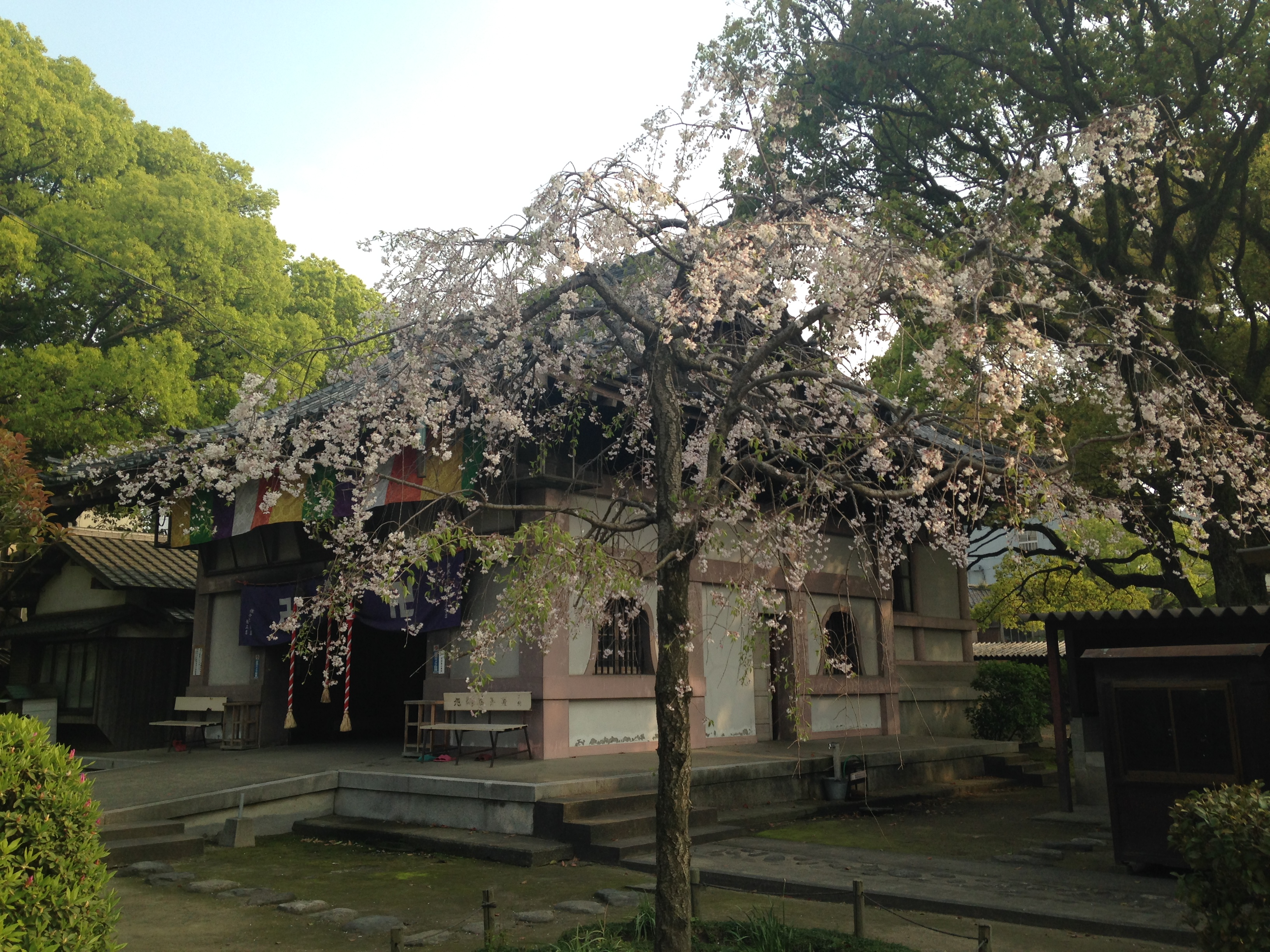 崇福寺・地蔵堂の近くにあるシダレザクラ